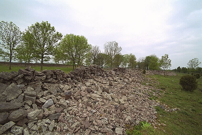 Fornborg Motiv: Träbyborg Nyckelord: Riksintressen, Världsarv Kategori: Fornborg Fornborg.